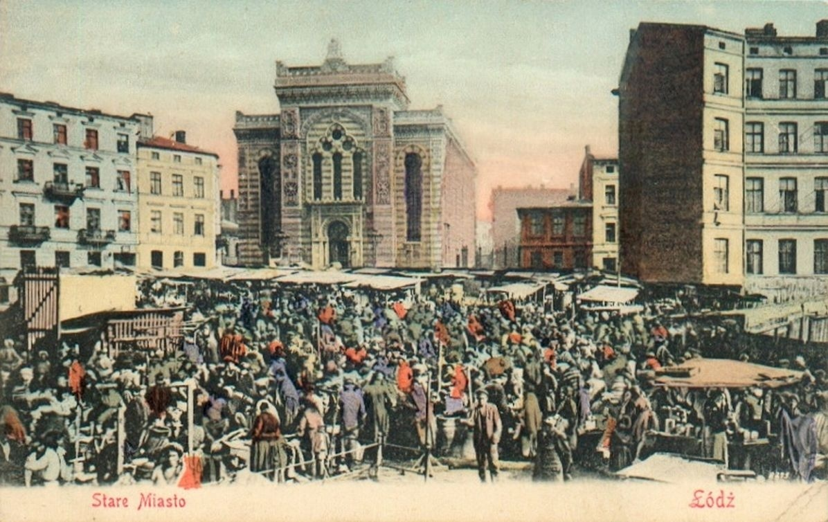 Alte Szil synagogue in Lodz